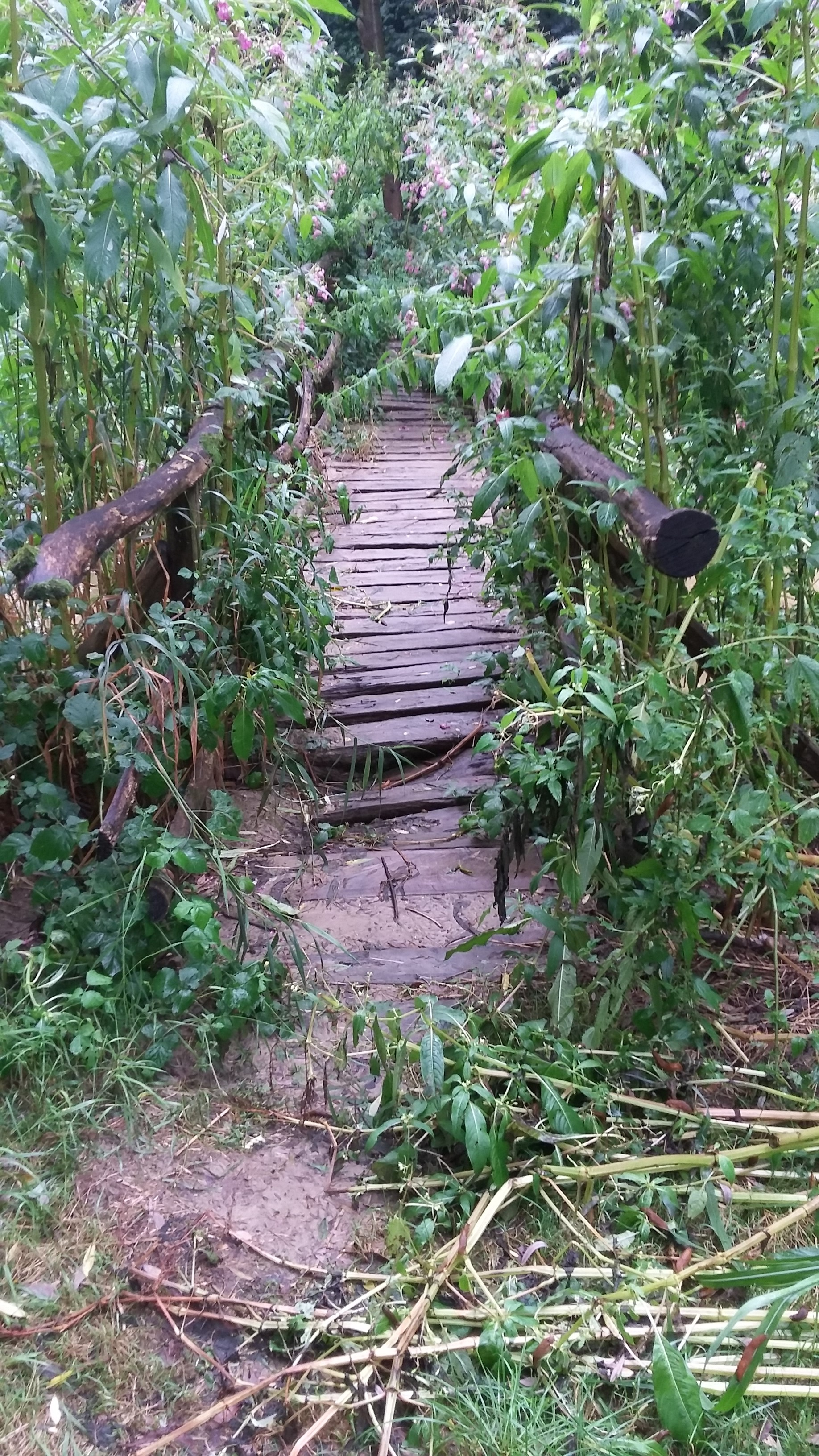 Brücke am Schwarzaubach am Murwanderweg in Weitersfeld an der Mur